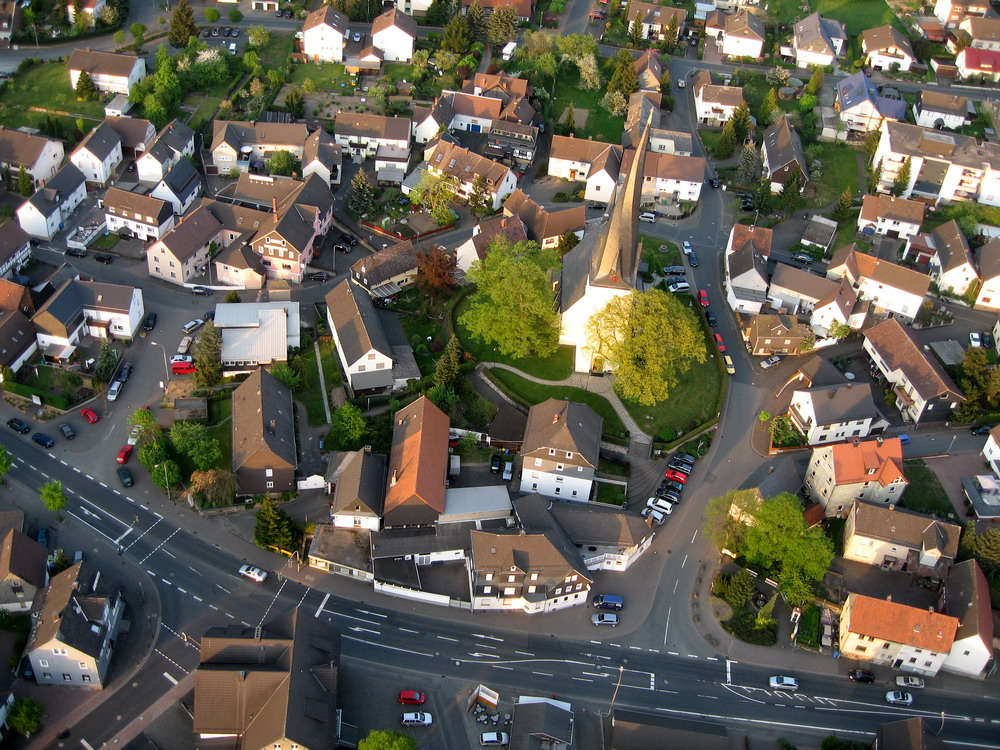 ev. Kirche Breidenbach